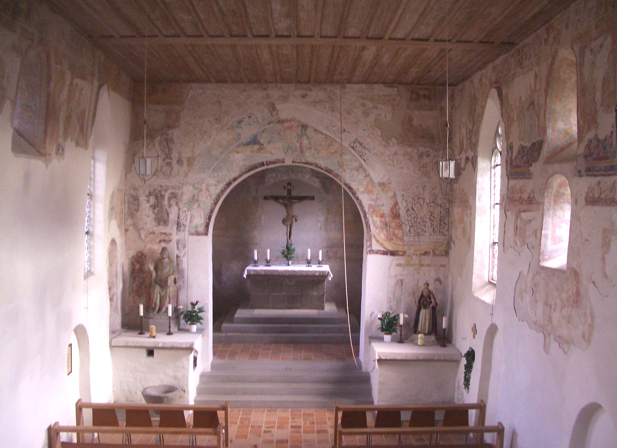 Überlingen, Germany: Kapelle St. Sylvester in Goldbach